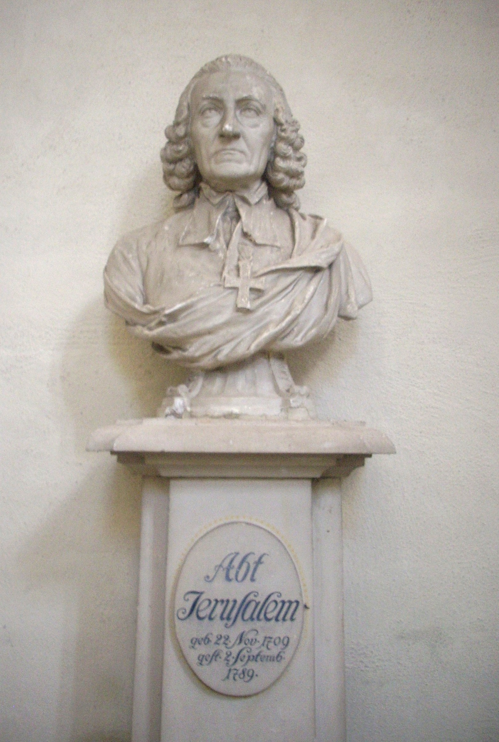 Riddagshausen Klosterkirche, Grabbüste Johann Friedrich Wilhelm Jerusalem (1709-1789), prot. Theologe, Abt von Riddagshausen